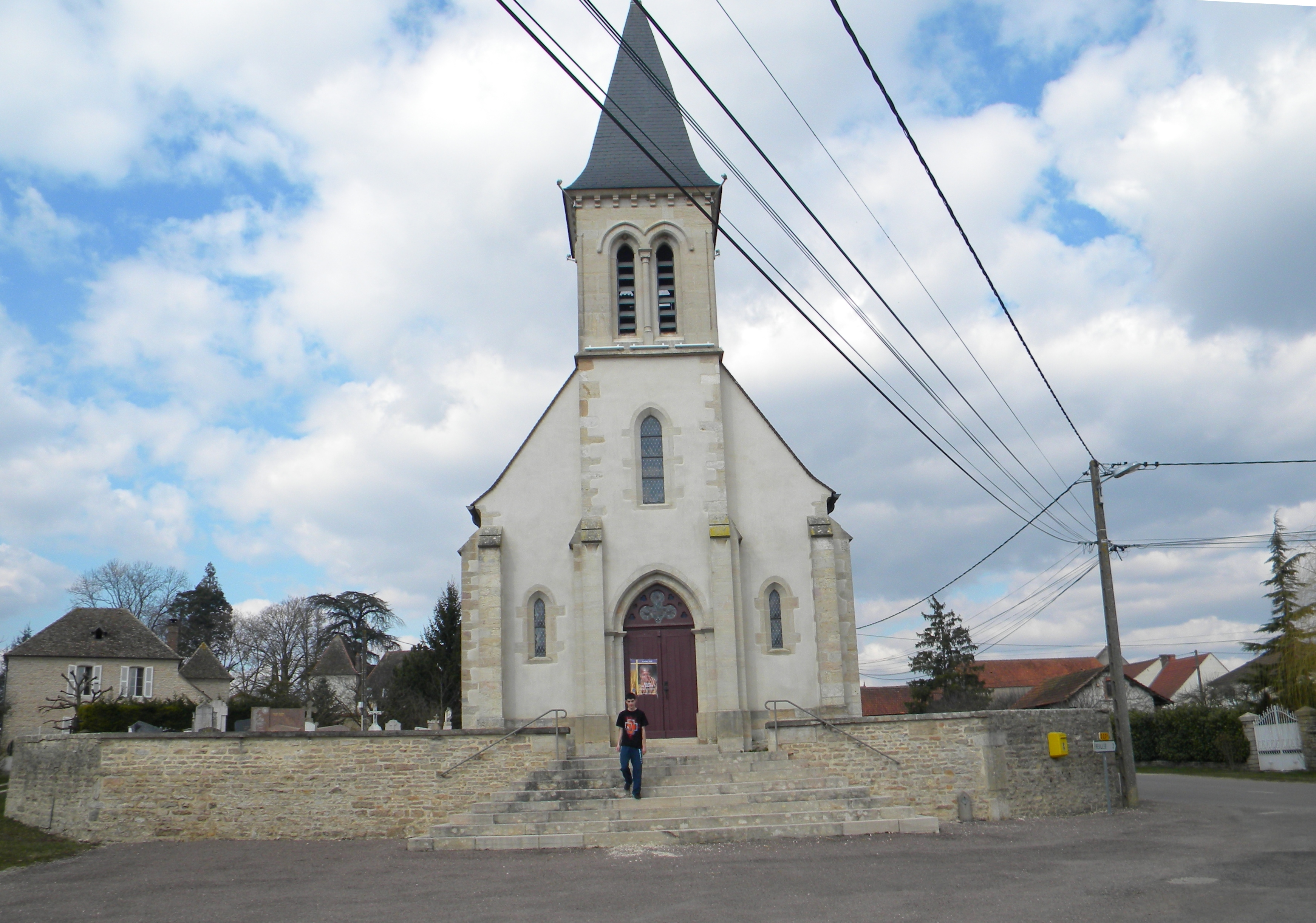 Kirko de Marigny-les-Reullée